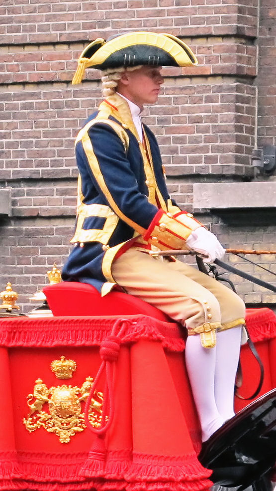 Koninklijk Koetsier